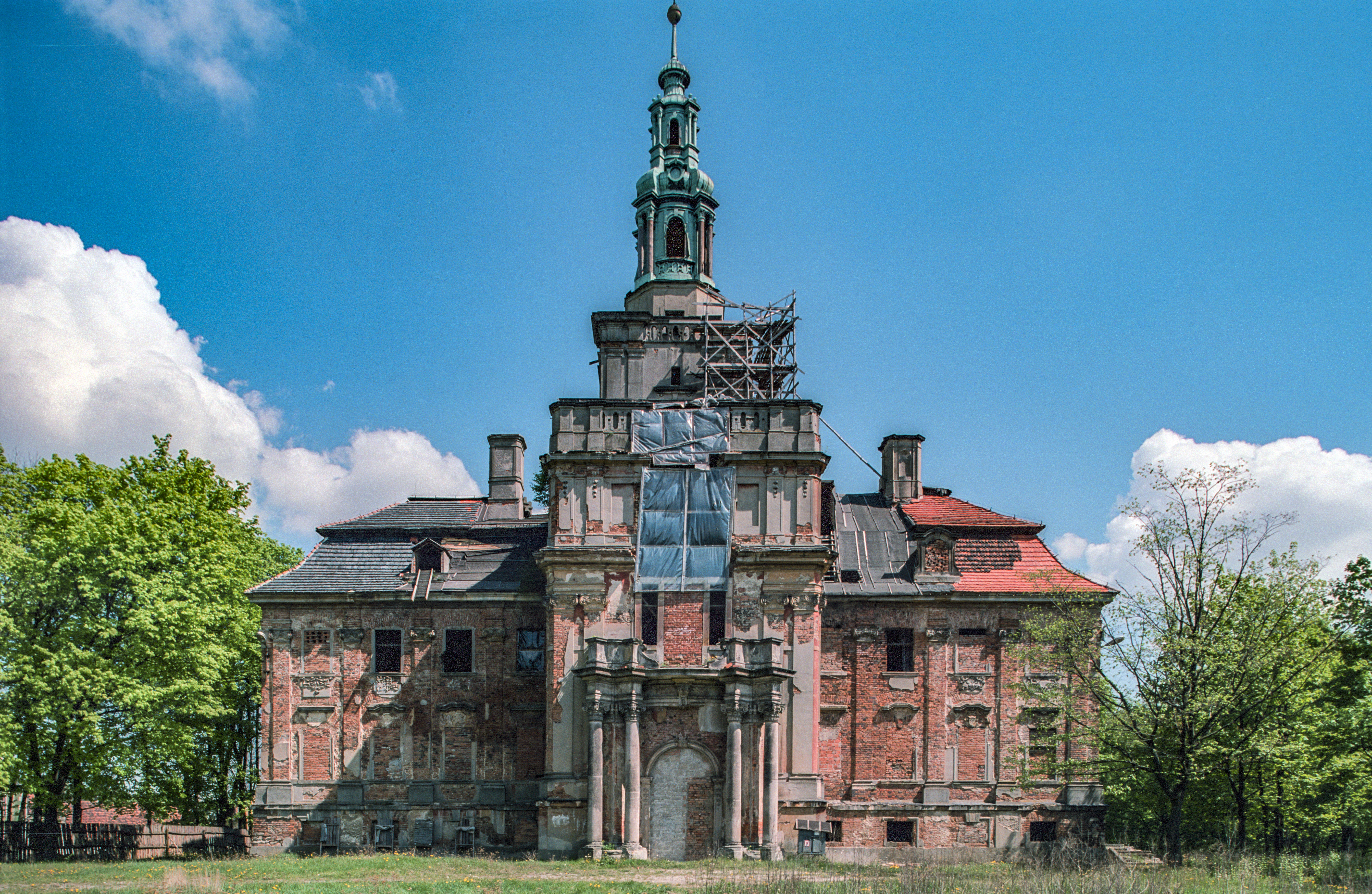 Chocianów